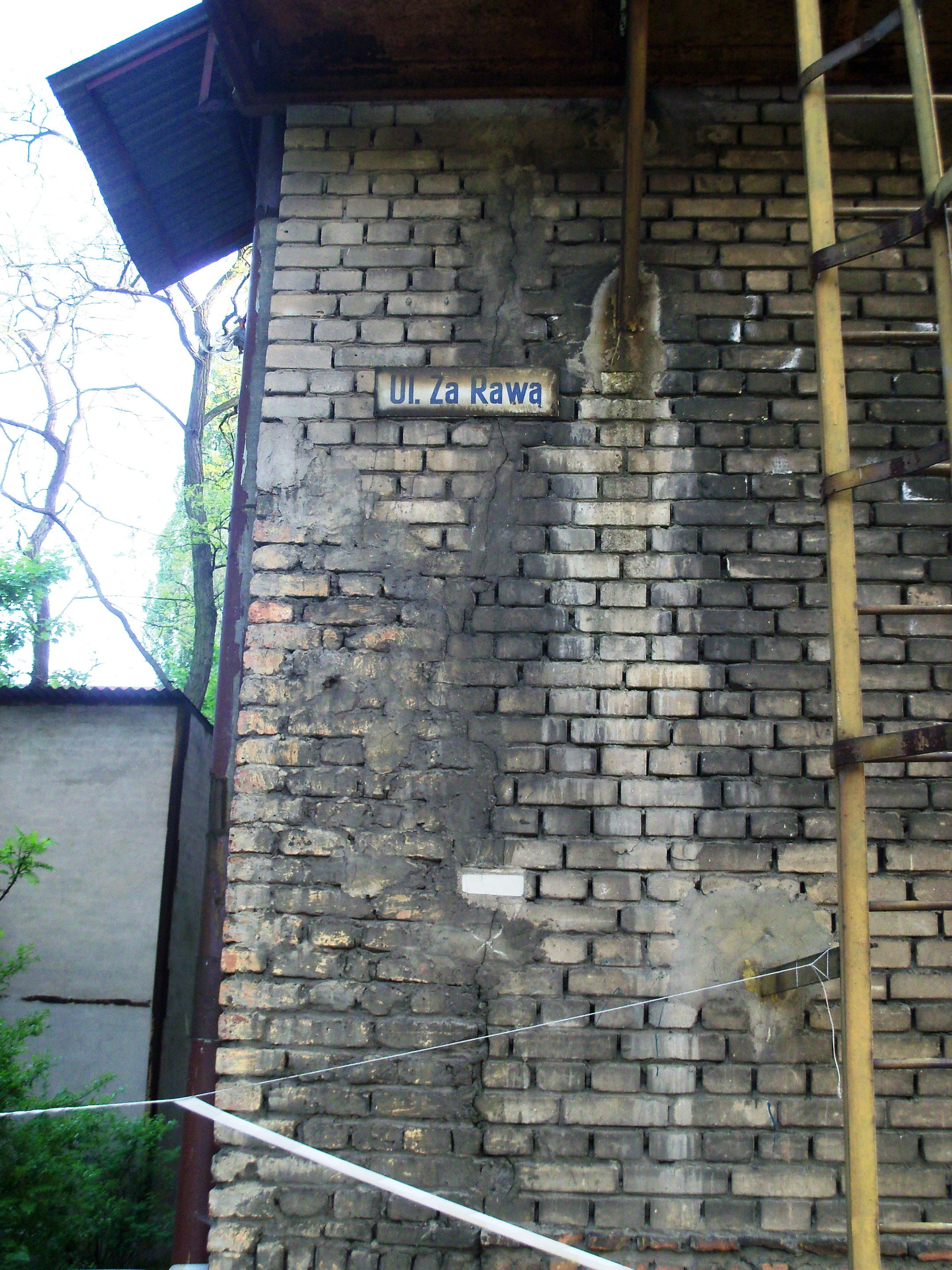 Huta Baildon w Katowicach